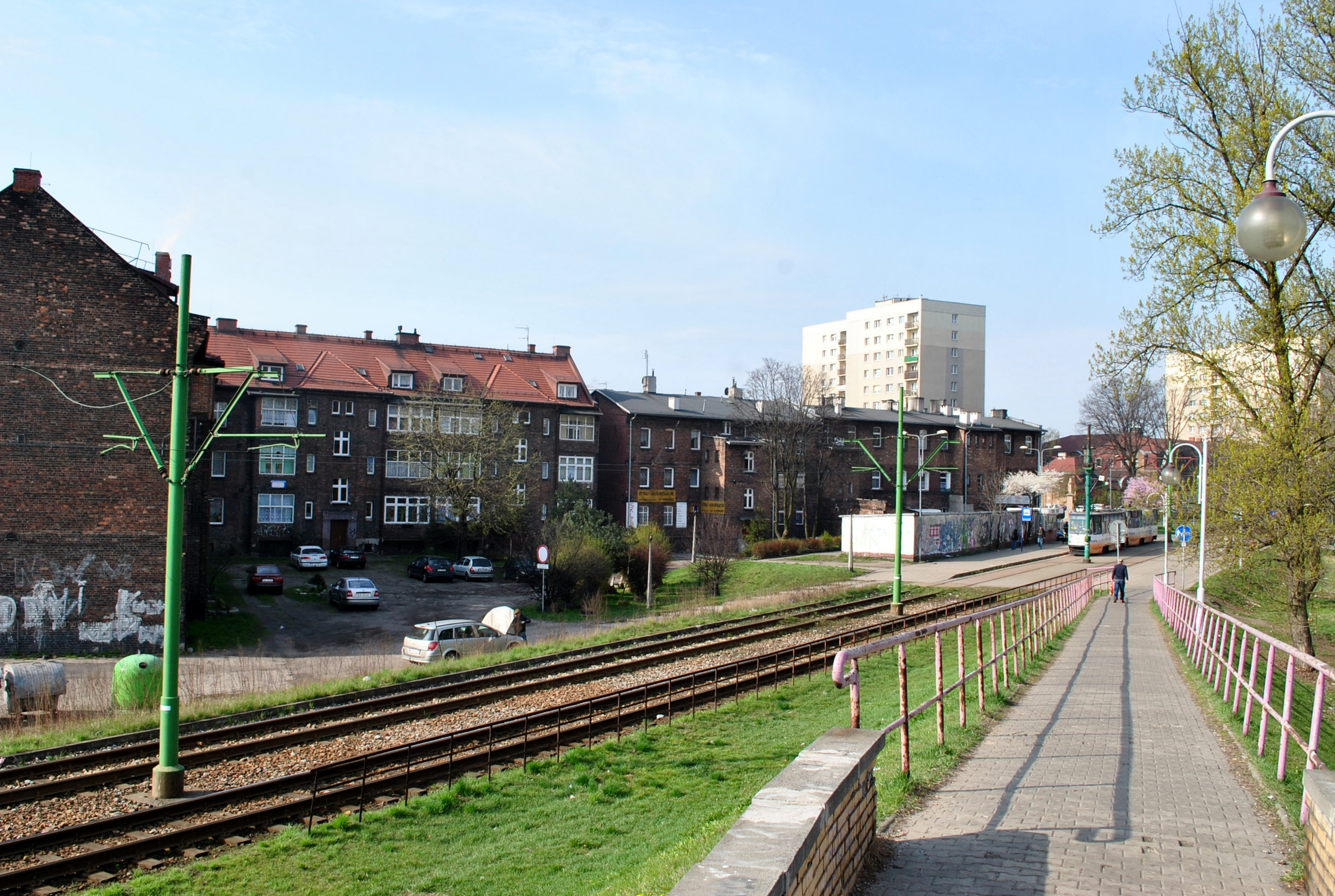 Katowice - Załęże. Przystanek tramwajowy Załęże Wiśniowa przy ul. Gliwickiej